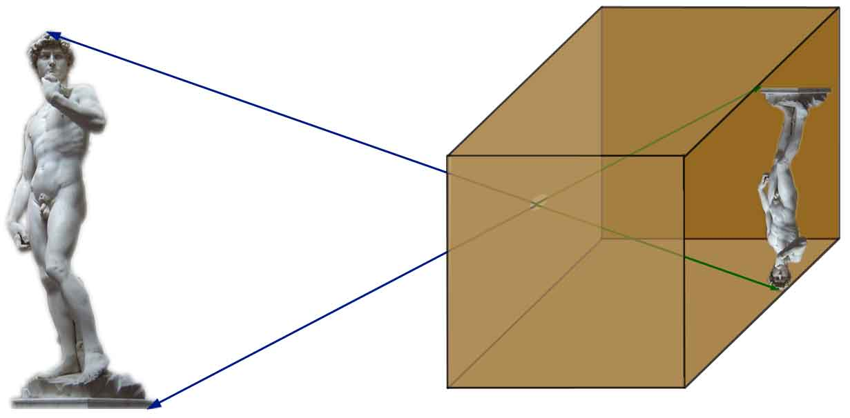 Summary Figure illustrant le principe de l'homothétie à travers le principe de la chambre noire. Jean-Luc W 24 avril 2006 à 23:14 (CEST)